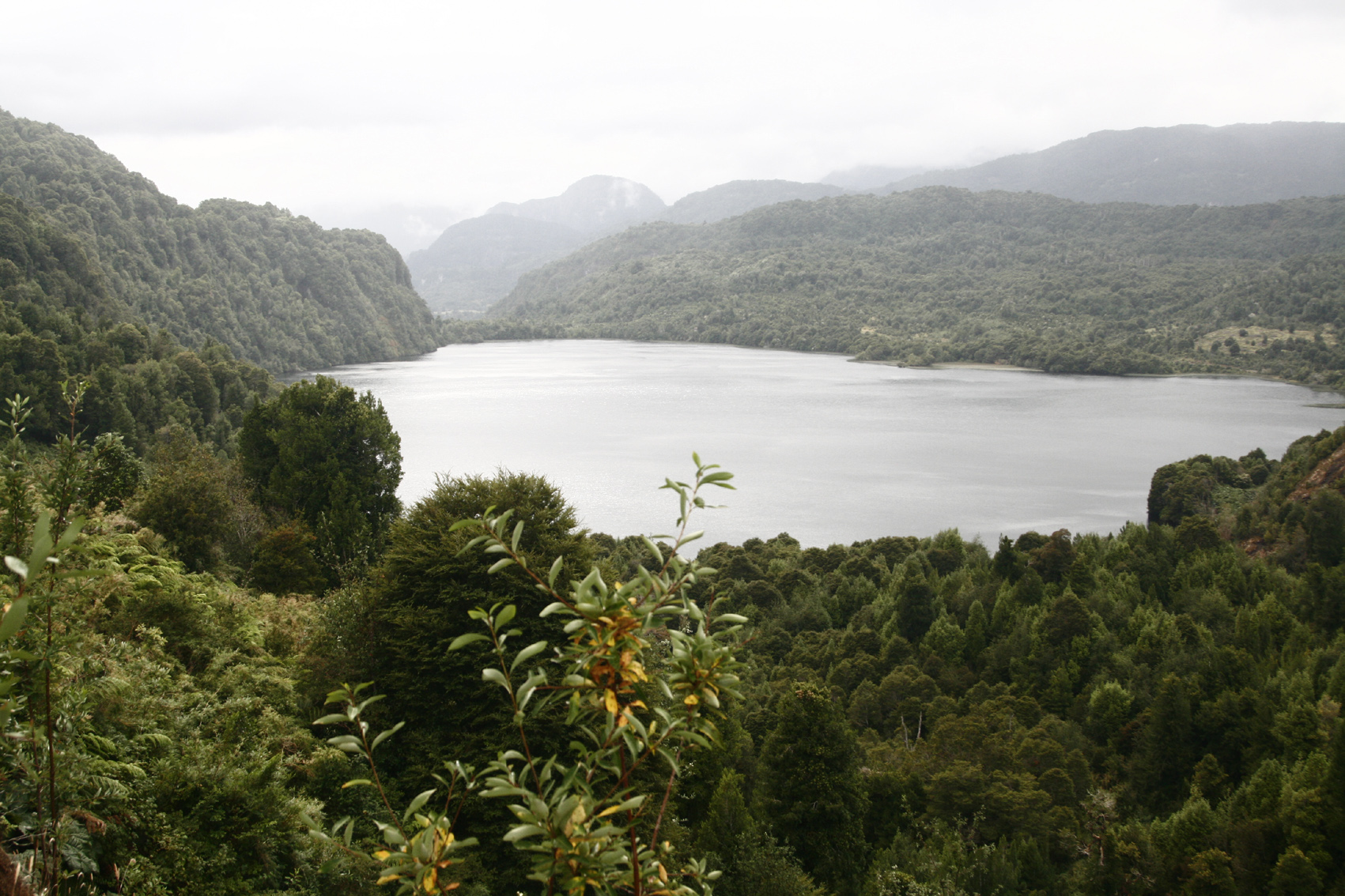 Template:Ficha de laguna